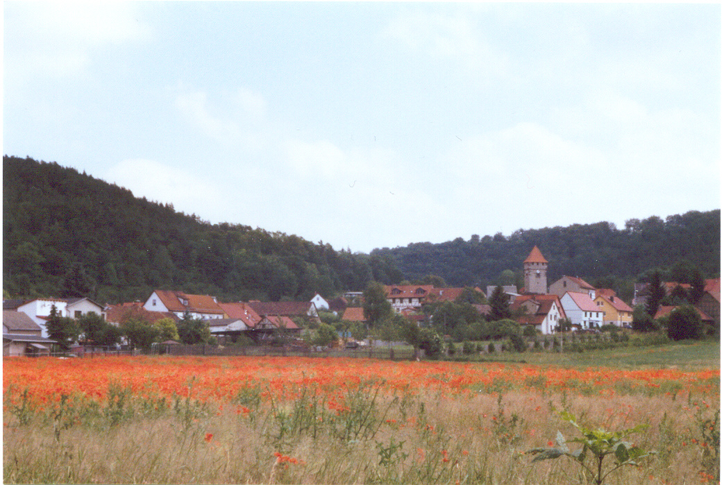 Siegelbach bei Arnstadt in Thüringen, Deutschland.